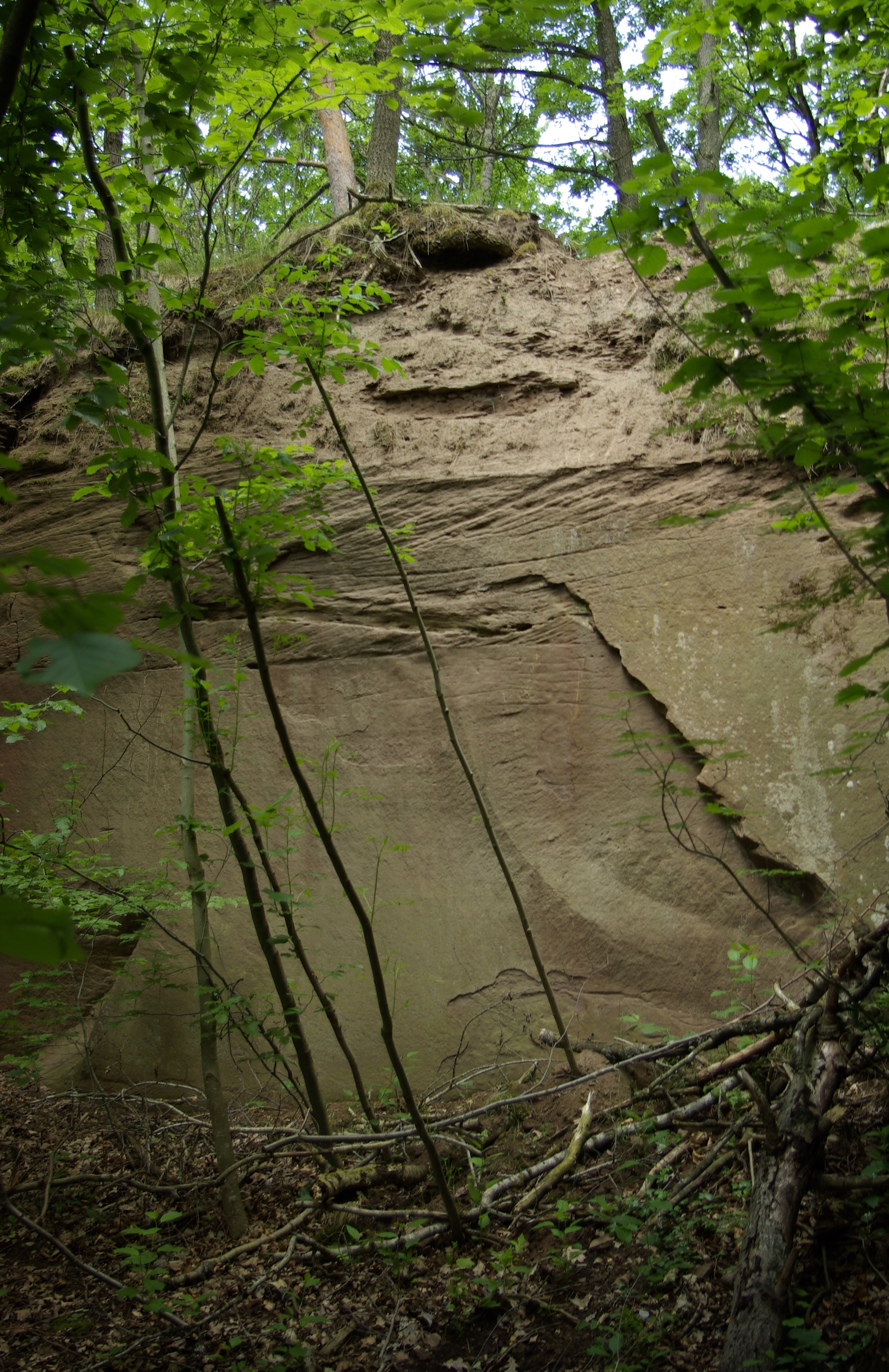 Steinbruch östlich der Fingalshöhle bei Obernzenn, Geotop 575A002.